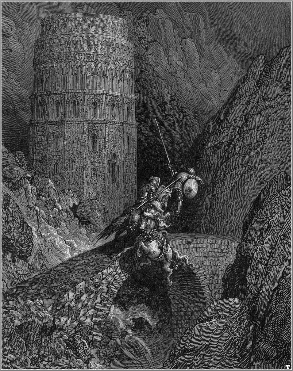 illustration of Ludovico Ariosto’s “Orlando Furioso”.